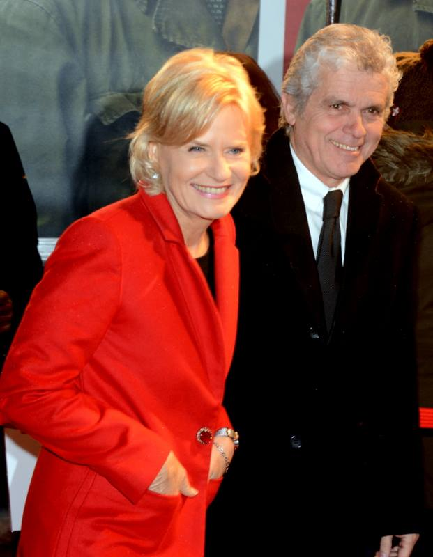 Catherine Ceylac et Claude Sérillon à l'avant-première française de "The Monuments men"